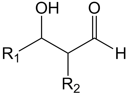 Aldol algemene structuurformule